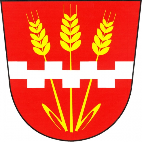 znak obce Měrovice nad Hanou